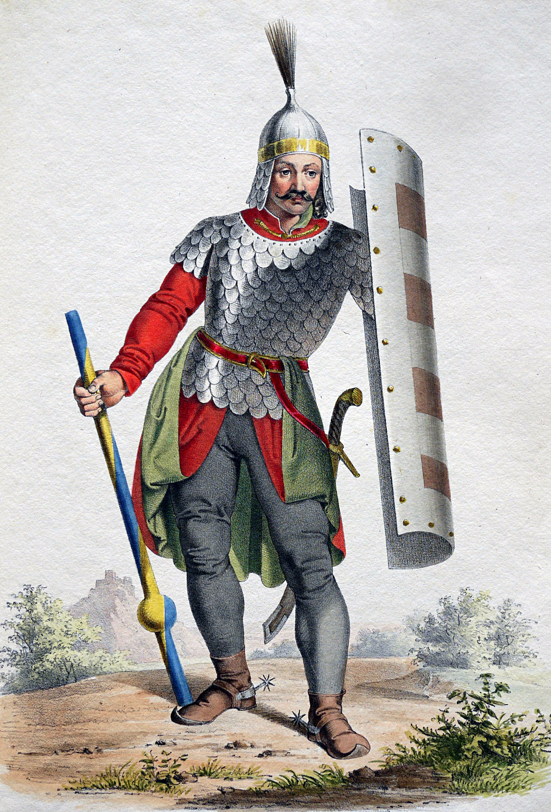 Taksony (931-970), Großfürst der Ungarn, Lithographie von Josef Kriehuber nach einer Zeichnung von Moritz von Schwind aus Ungerns Erste Heerführer Herzoge und Koenige In einer Reihe von Bildnissen von Bela bis auf Seine Majestät Franz I. Kaiser Von Österreich König Von Ungern &c., &c. Wien : Lithographisches Institut ;ca. 1828